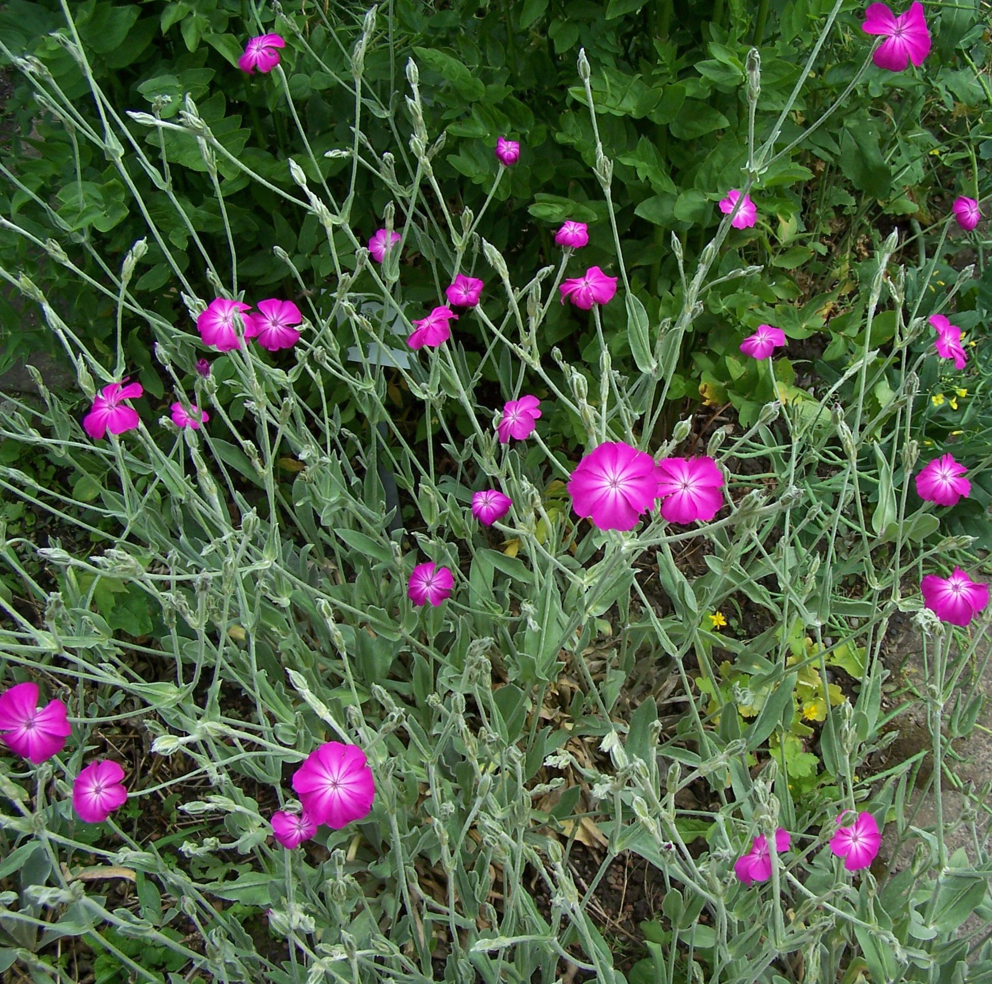 Lychnis coronaria 17 juin 2006 Vieux jardin botanique de Göttingen